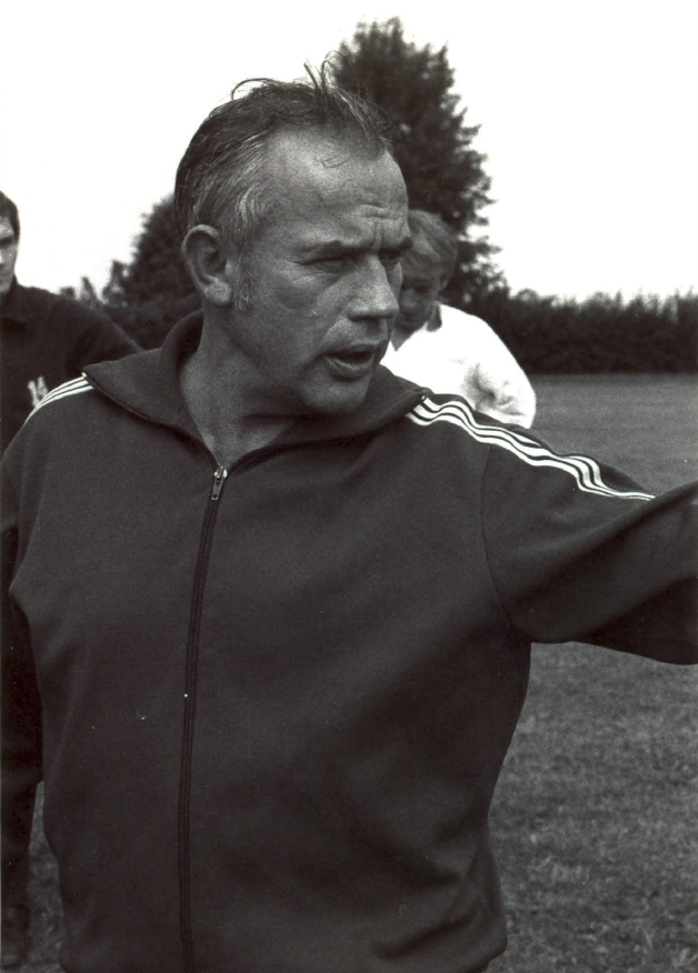 Hennes Weisweiler im Vorbereitungstrainingslager Schöneck